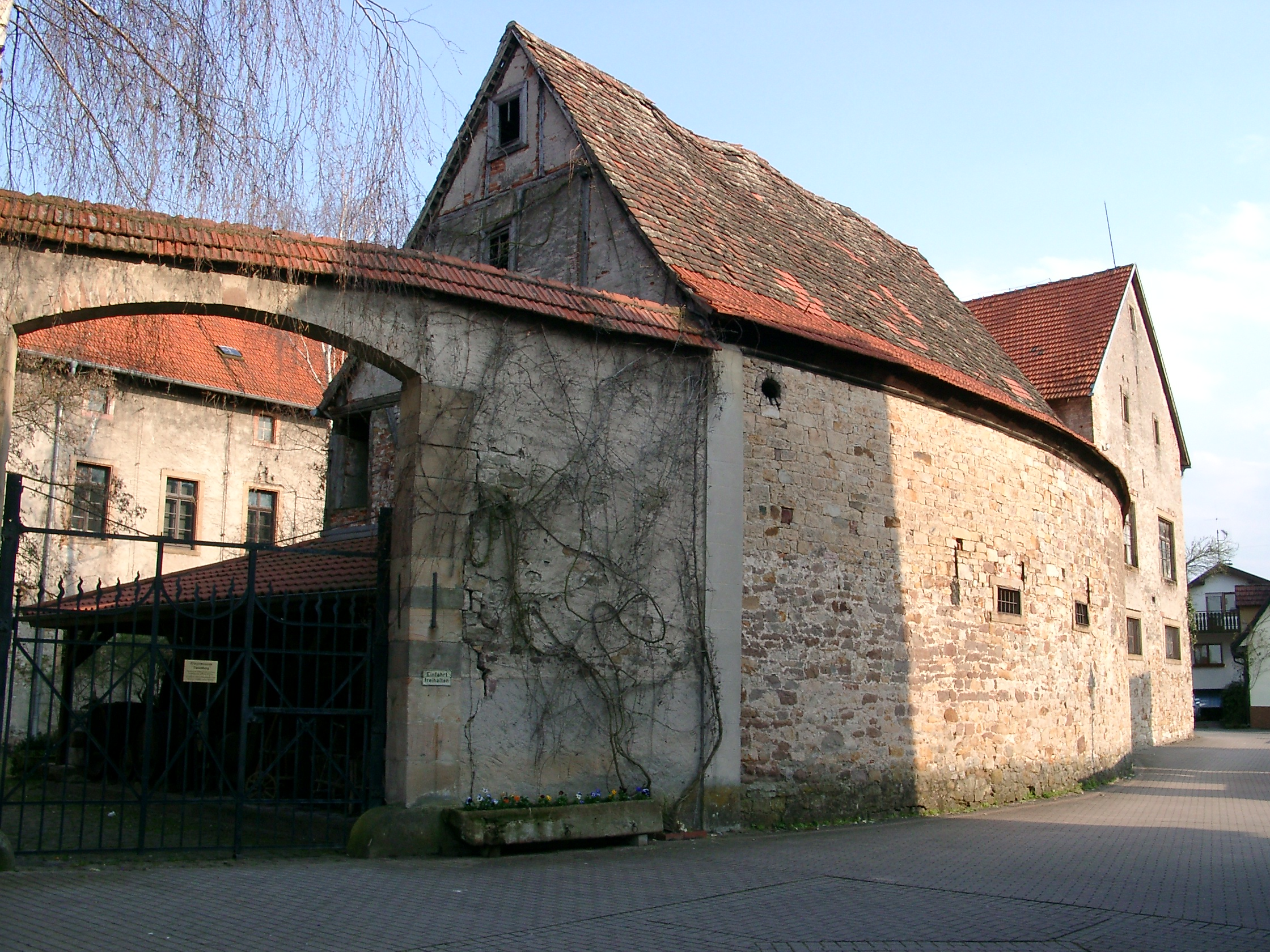 Rauenberg, Winzermuseum, ehem. Schloss